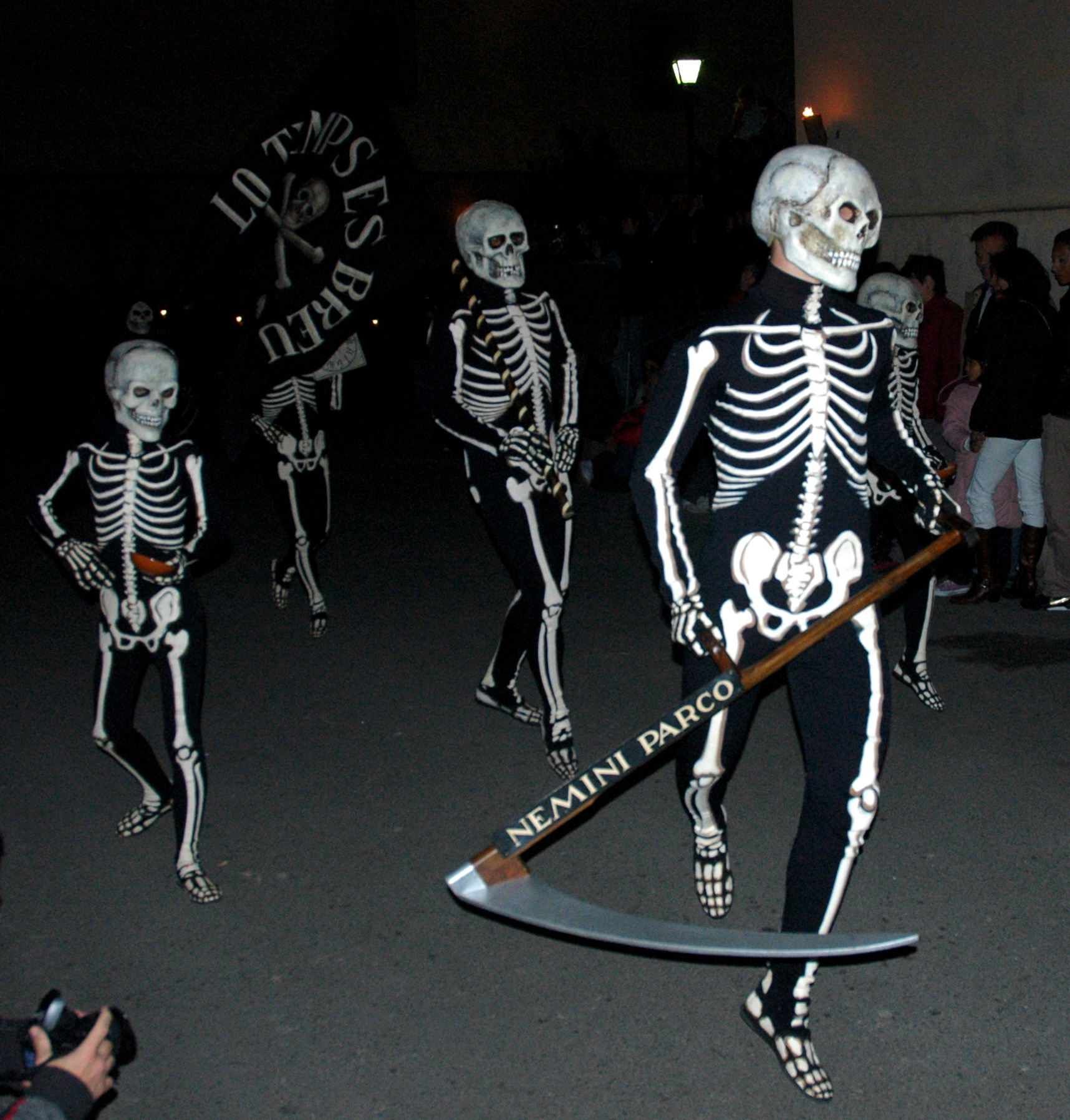 Danzantes llevando sus elementos simbólicos: estandarte con la inscripción en catalán "Lo temps és breu" (el tiempo es breve) y guadaña con la inscripción en latín "Nemini parco" (a nadie perdono)